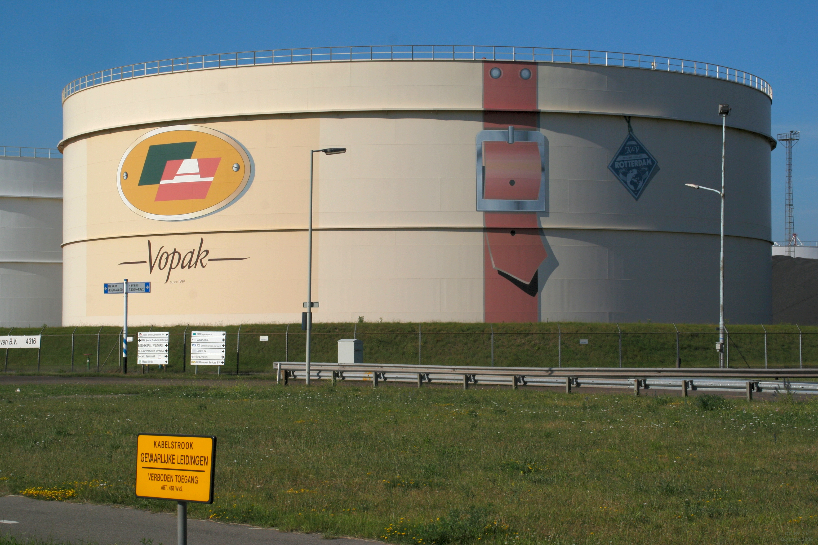 Een tank van Vopak Terminal Laurenshaven BV in de Botlek, beschilderd als hoedendoos (als verwijzing naar Pakhoed, één van de fusiepartners waaruit Vopak is ontstaan). Eigen werk.